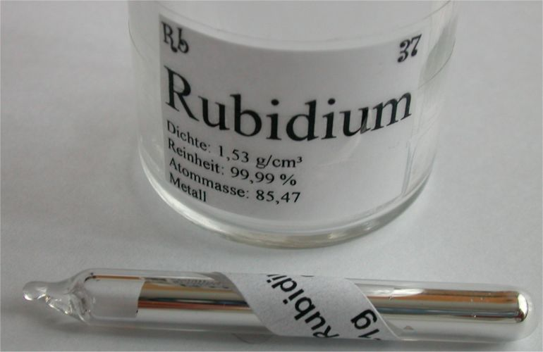 Bildbeschreibung: 1g hochreines Rubidium (99,99%) in einer Ampulle unter Argongas. Quelle: eigenes Foto Fotograf: Tomihahndorf Datum: März 2006